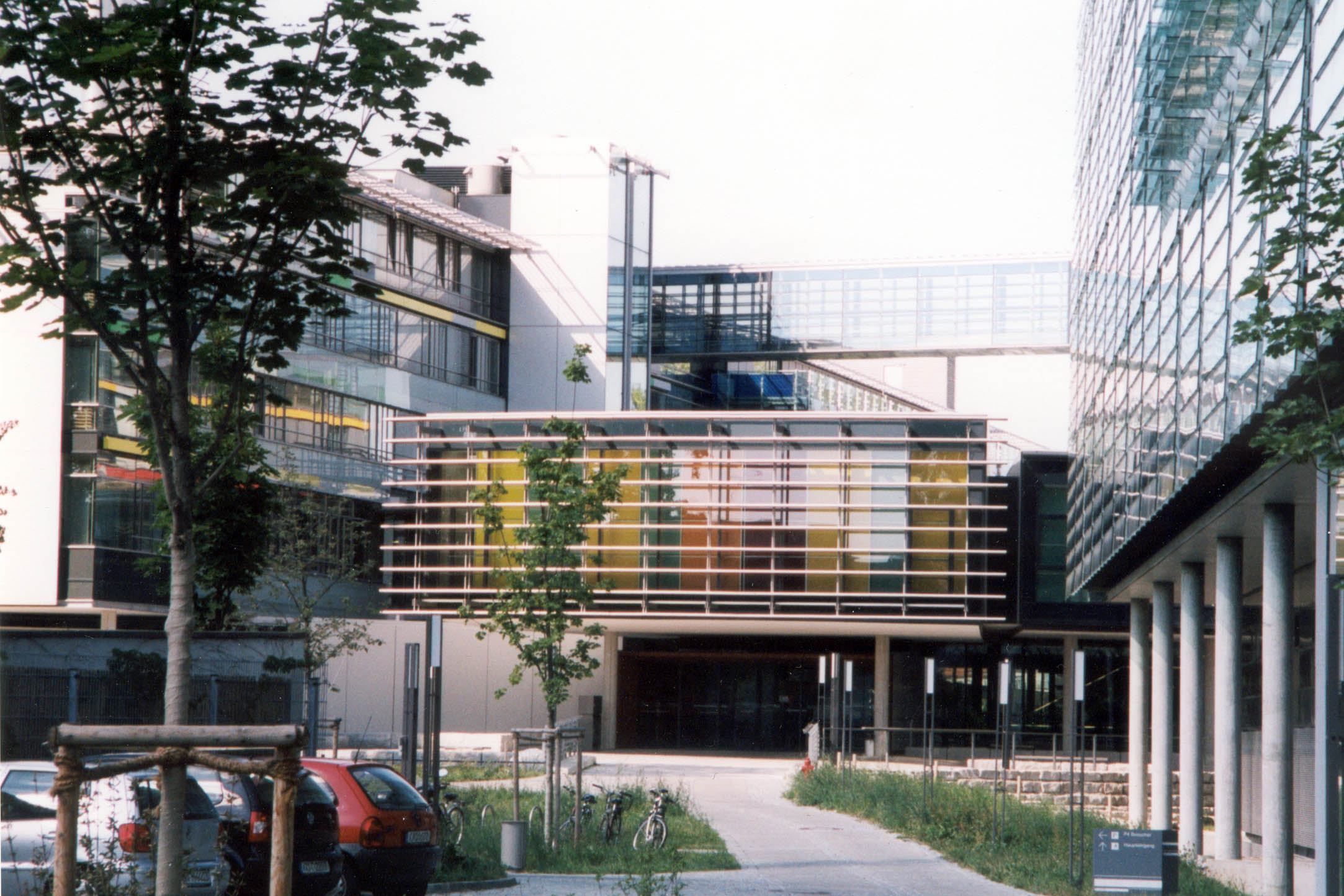 Hauptverwaltungsgebäude der Deutschen Rentenversicherung Schwaben